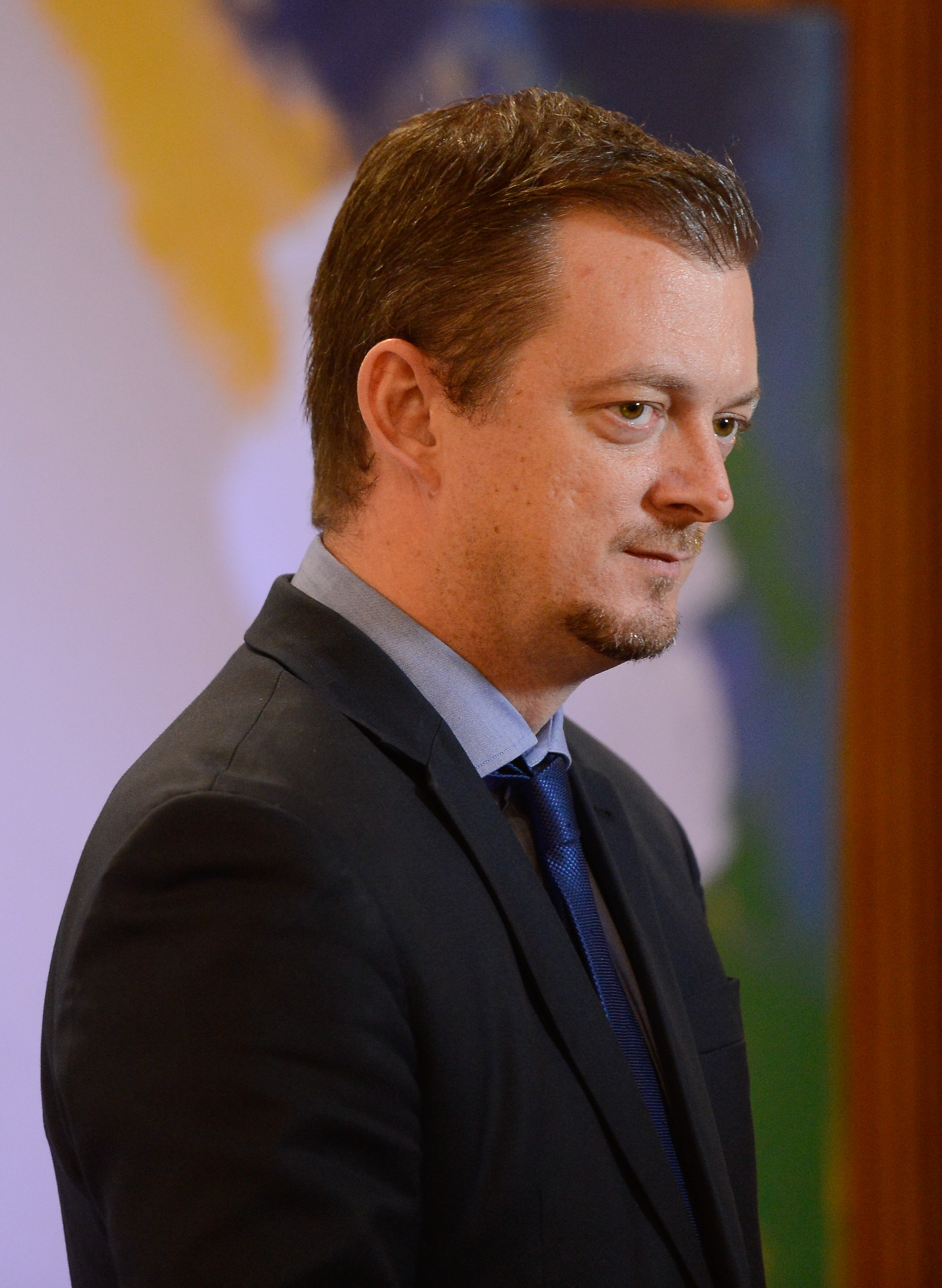 Rio de Janeiro - O presidente do Comitê Paralímpico Brasileiro, Andrew Parsons, no lançamento dos uniformes para as cerimônias de abertura e encerramento dos Jogos Paralímpicos Rio 2016 (Fernando Frazão/Agência Brasil)